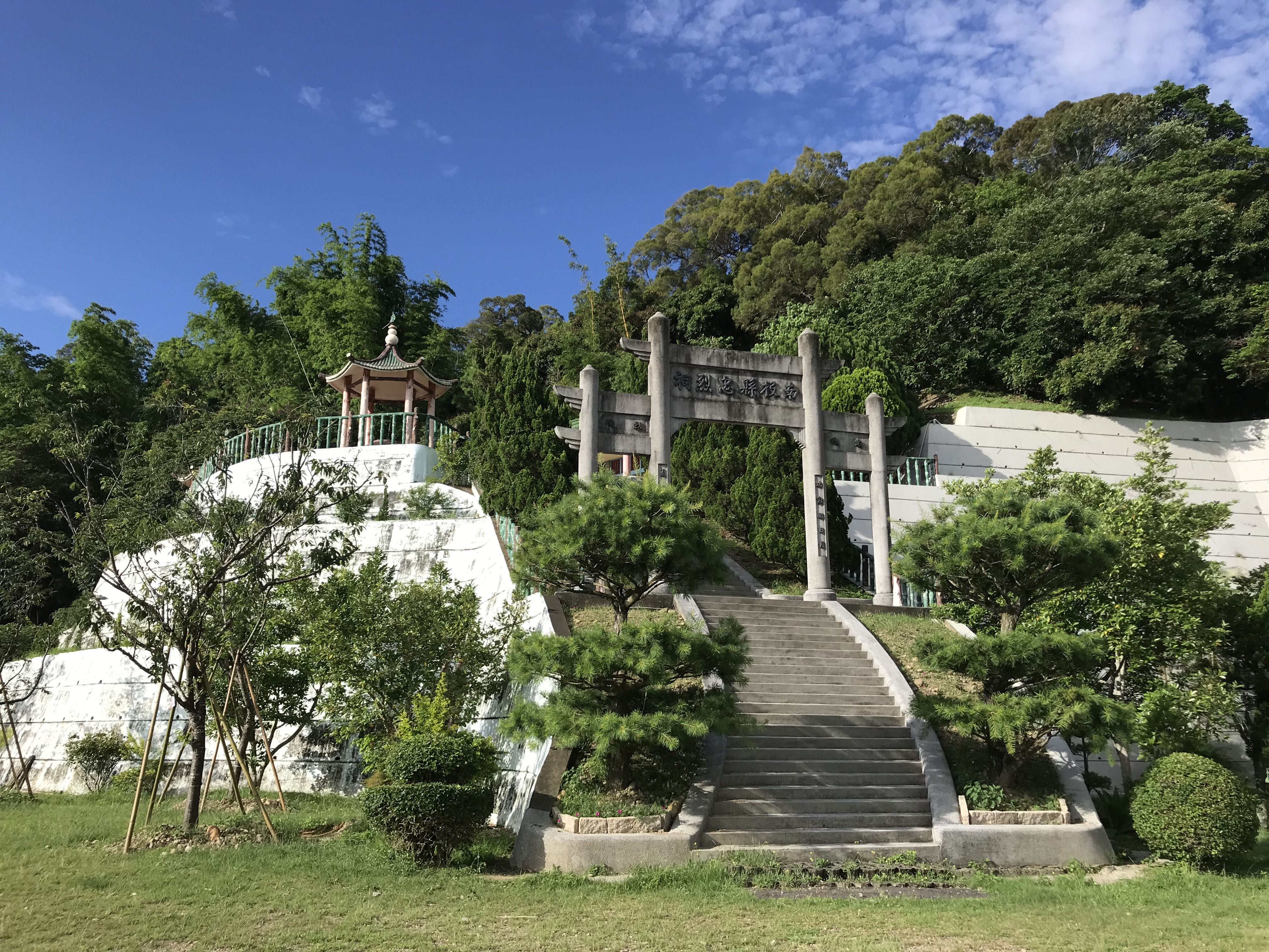 中文（台灣）: 南投縣忠烈祠入口